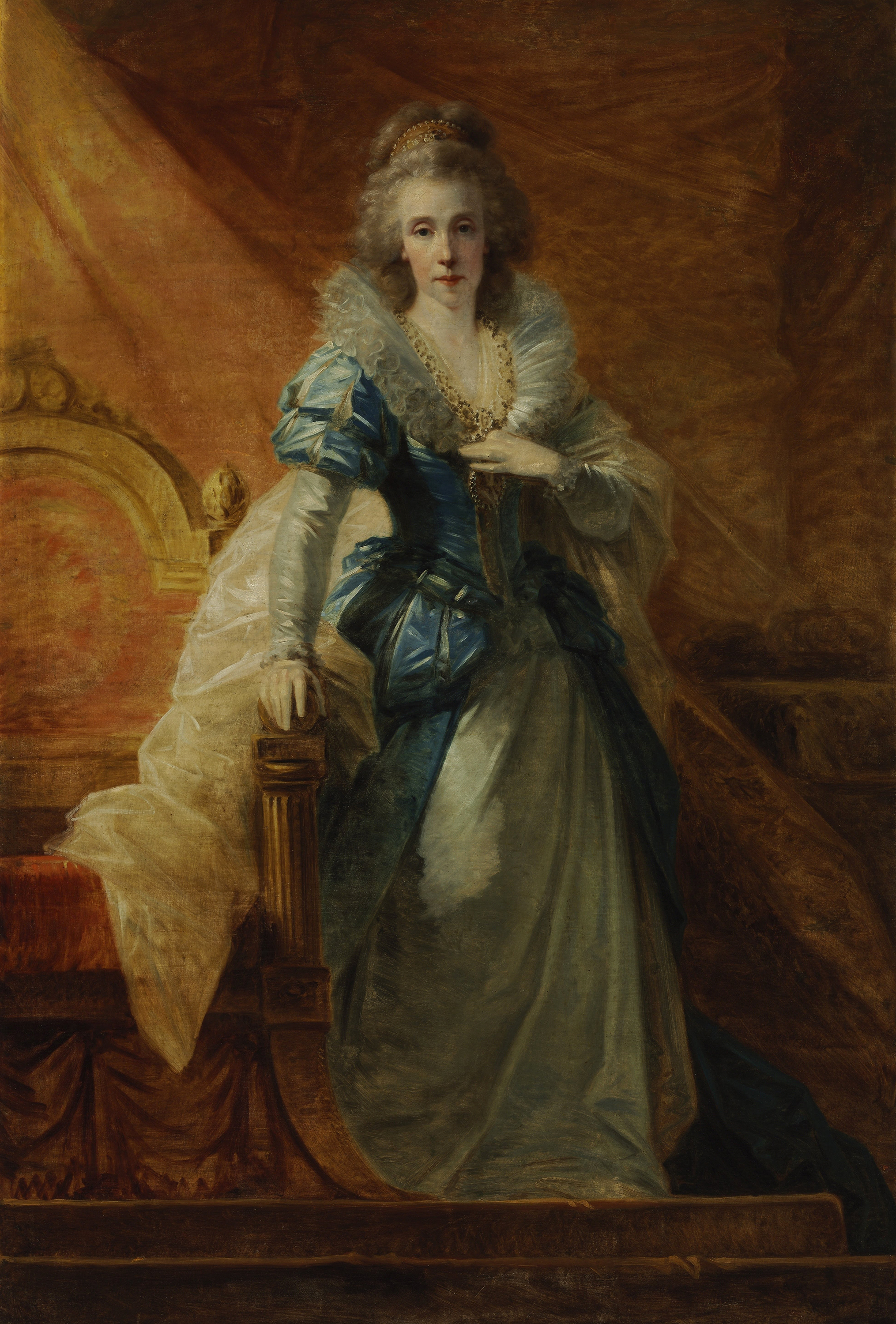 María Luisa de Borbón (1745-1792), Emperatriz del Sacro Imperio Romano Germánico, consorte de Leopoldo II.